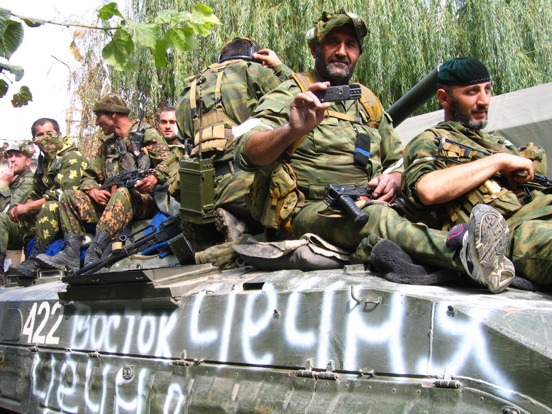 August 2008. Battalion Vostok in South Ossetia (Батальон «Восток» в Южной Осетии)